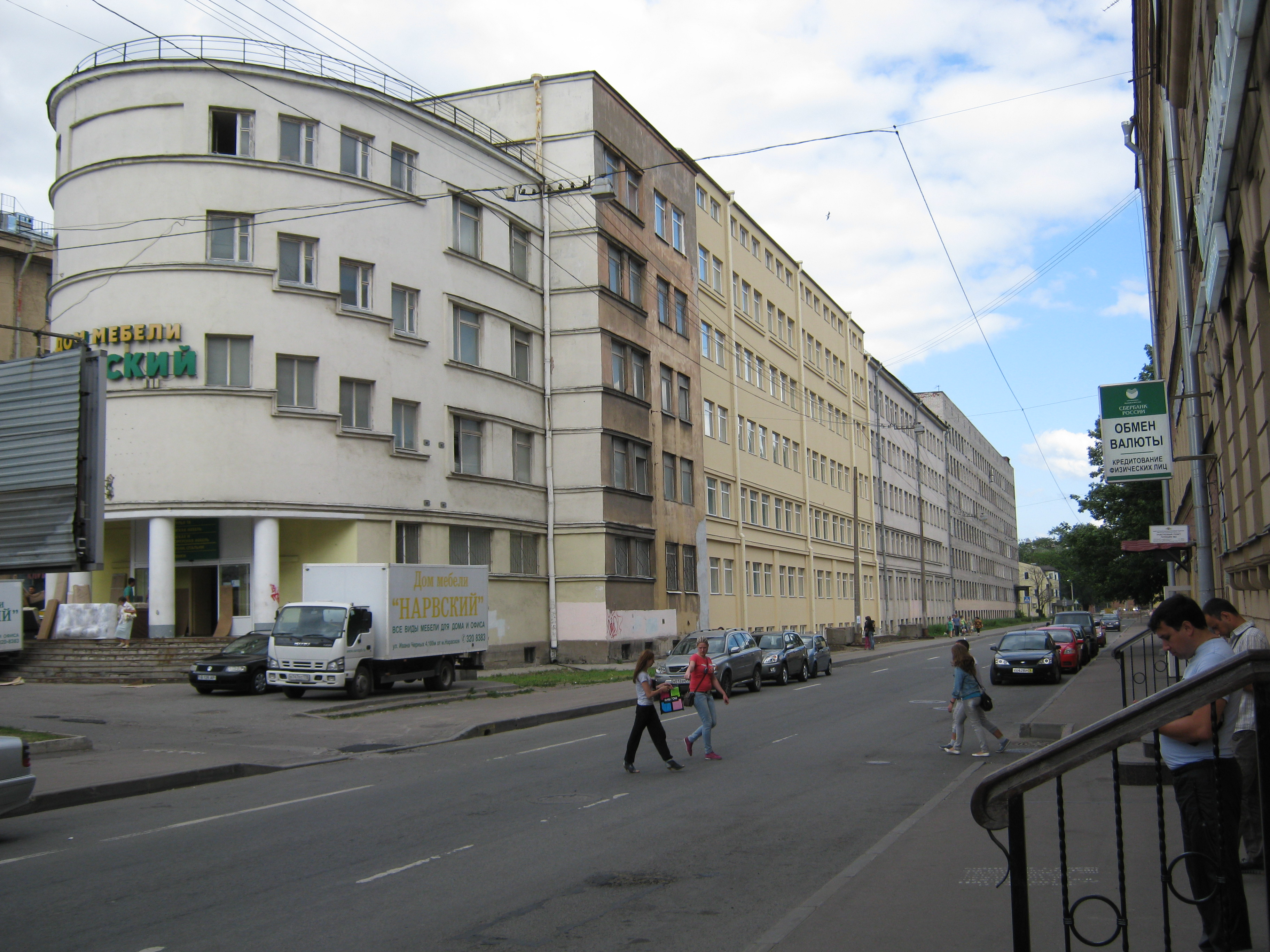 Так выглядит здание после восстановления центральной части. К сожалению, имеются отступления от первоначального внешнего вида, главное из которых - появление шестого этажа.